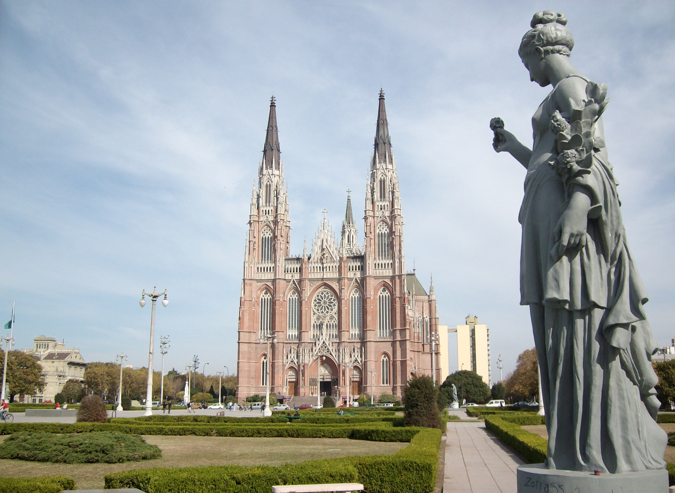 Calle 14 y 15